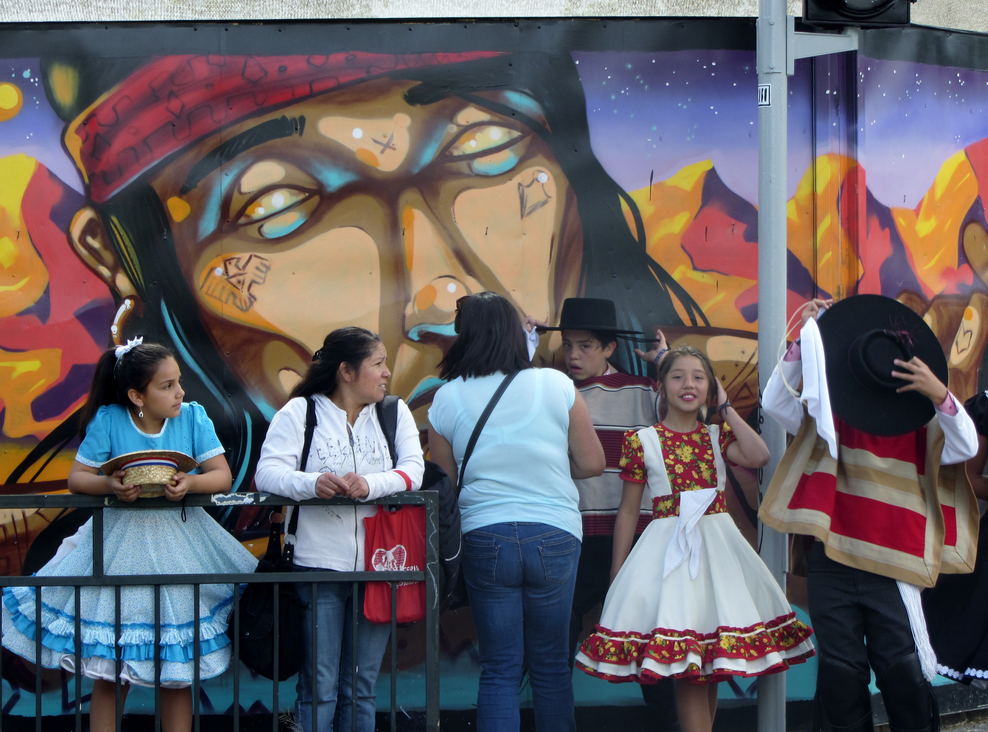 Cueca chilena. Niños vestidos de huaso en la intersección de Bellavista con Purísima (Santiago de Chile), esperando junto a un grafiti de Faya a que den la luz roja para poder bailar los autos y así ganar algo de dinero.